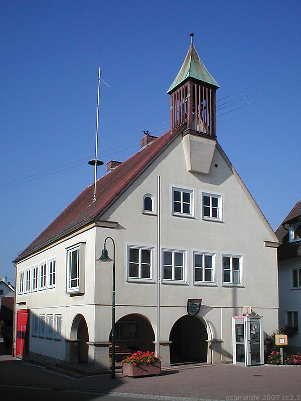 Ehem. Rathaus von Oedheim-Degmarn